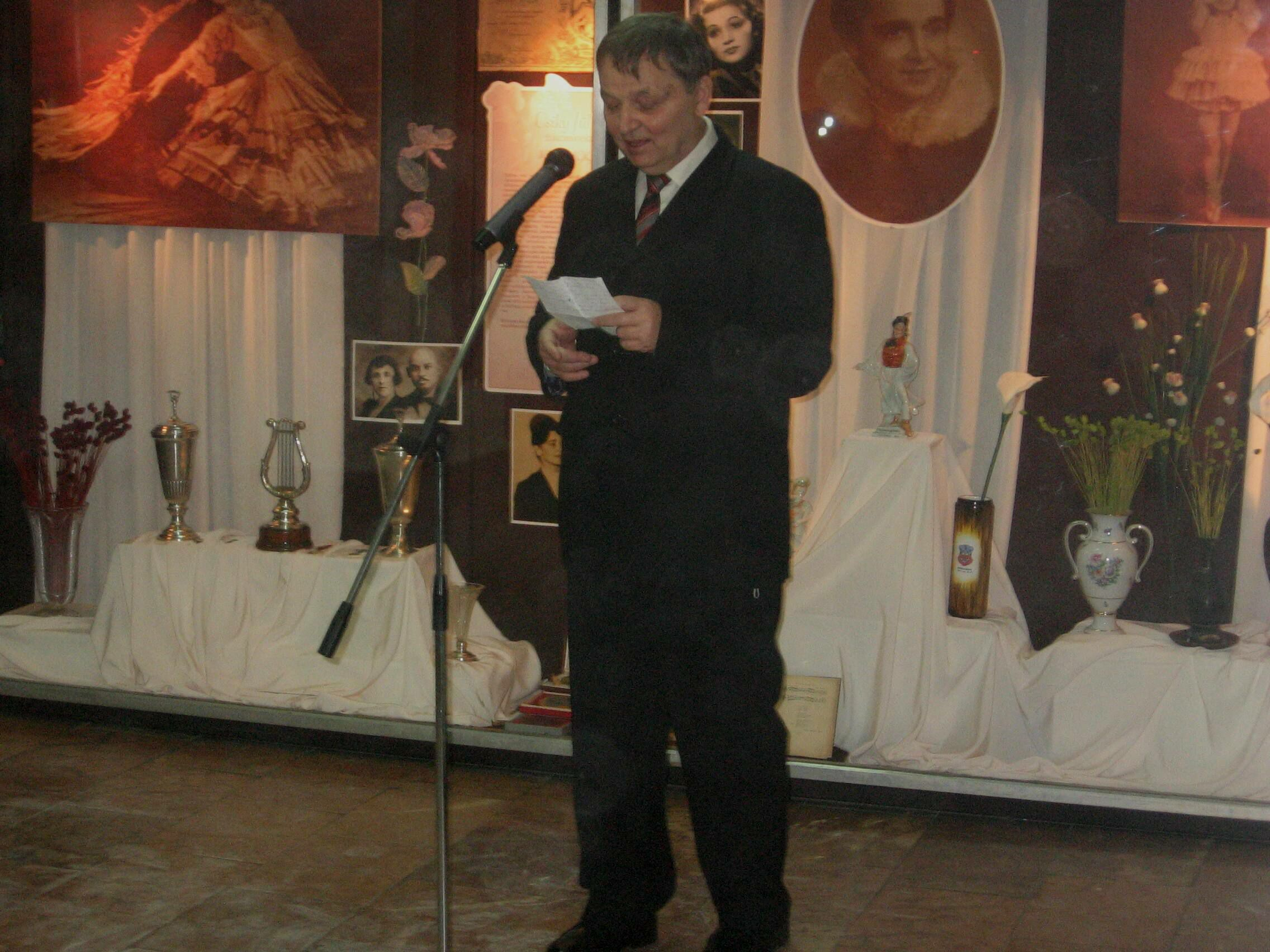 Csiki Antal az édesanyja, Csiki Júlia emlékére nyílt kiállítás megnyitóján, Mátészalkán